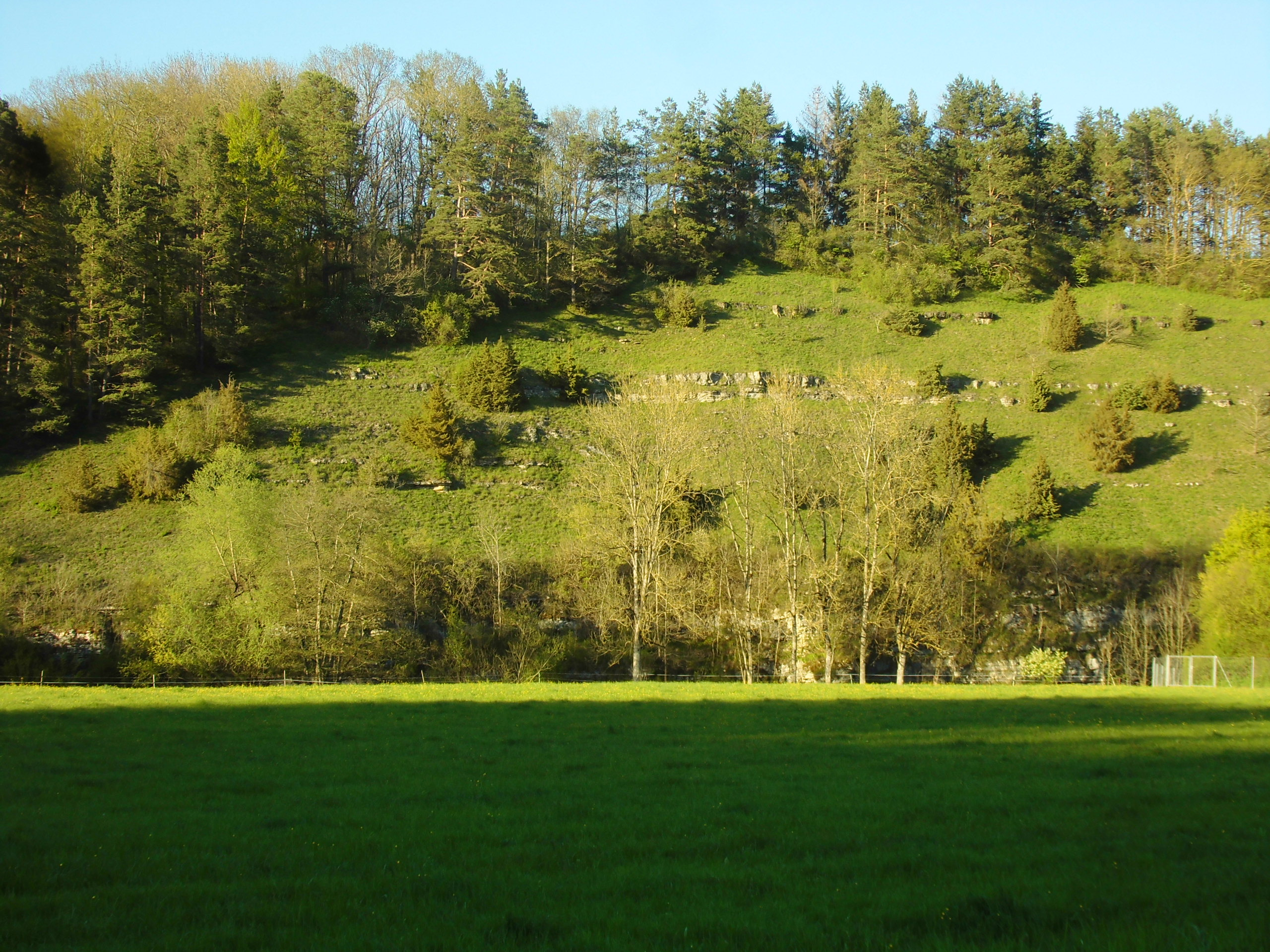 Naturschutzgebiet Kapfhalde rechts der Starzel